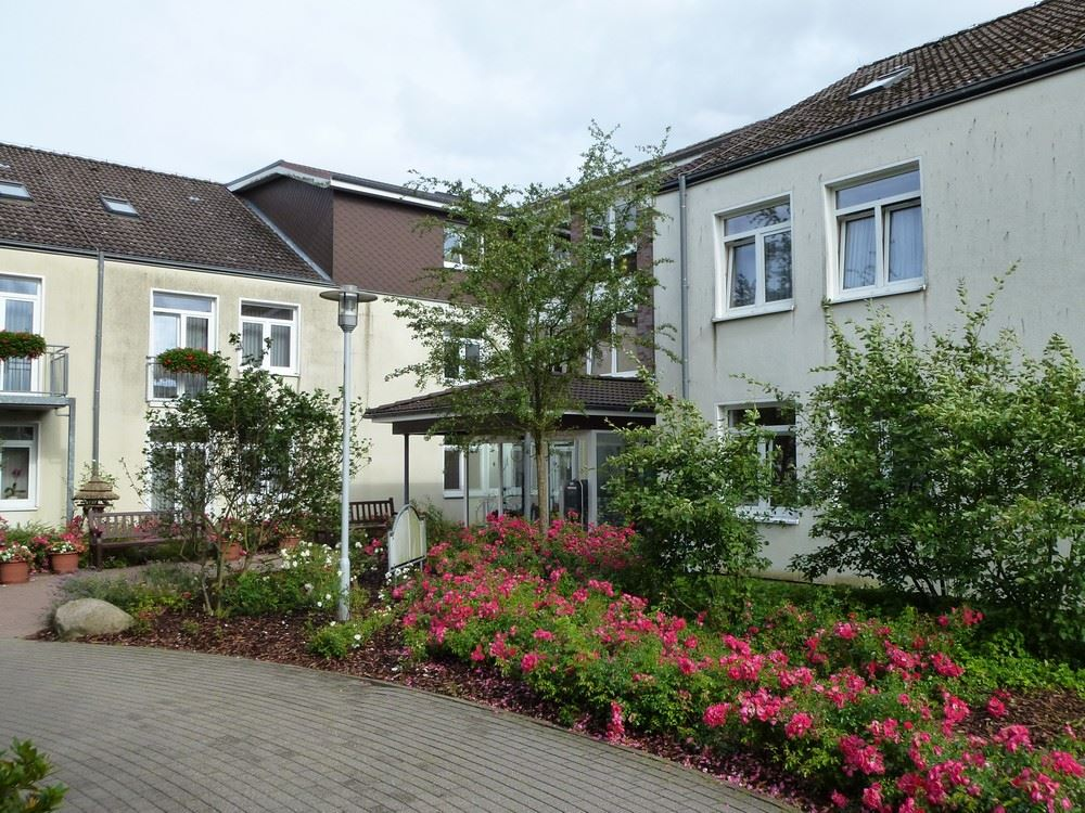 Eingangsbereich des Seniorenzentrums Osterfeld in Schiffdorf; früher Luftwaffenkaserne